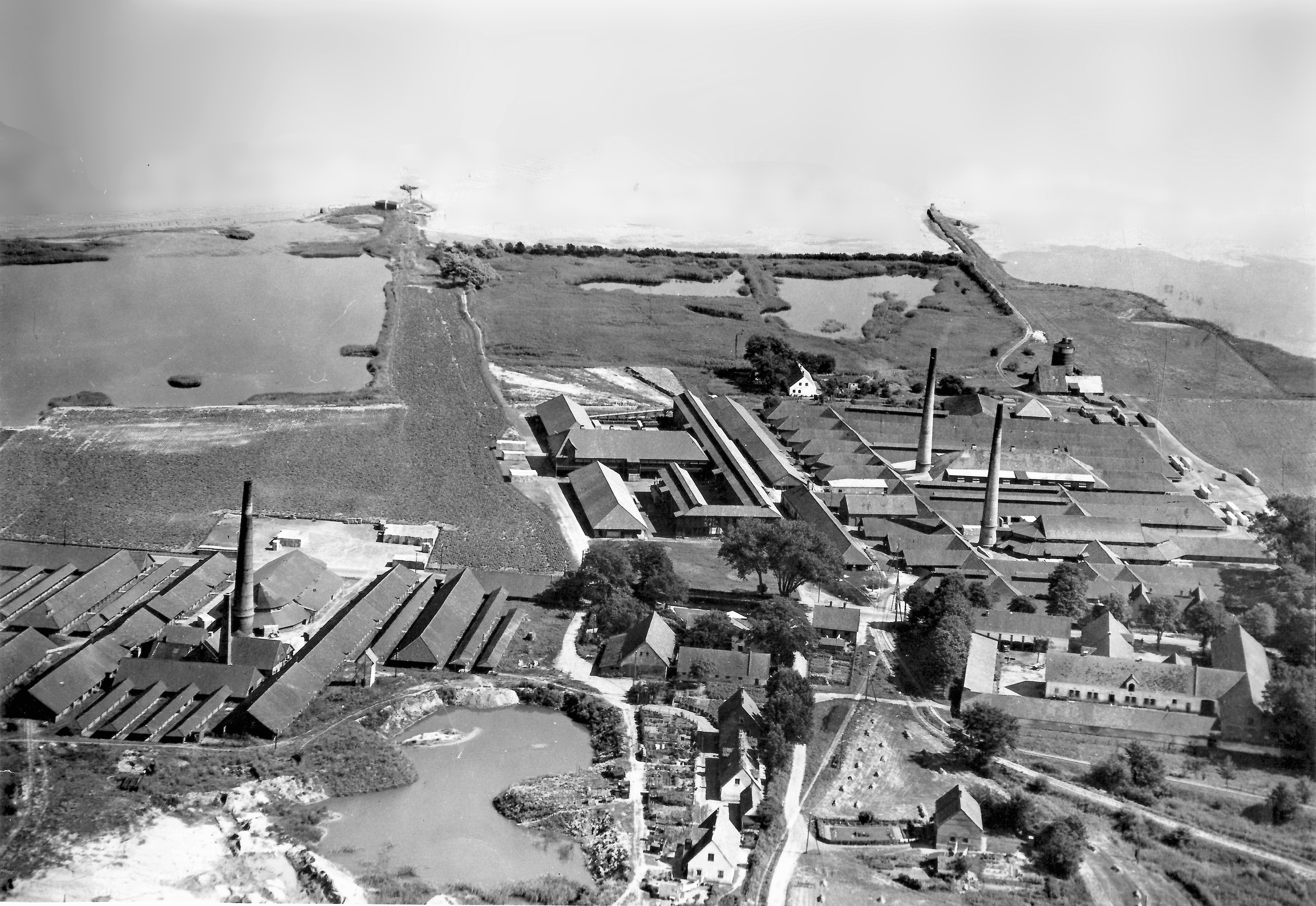 Kofoeds Teglværk (Nord) og Sølyst Teglværk (Syd), samt Sølyst Avlsgaard set fra vest mod øst udover Øresund, ca. 1930 før anlæggelse af vandstrandvejen